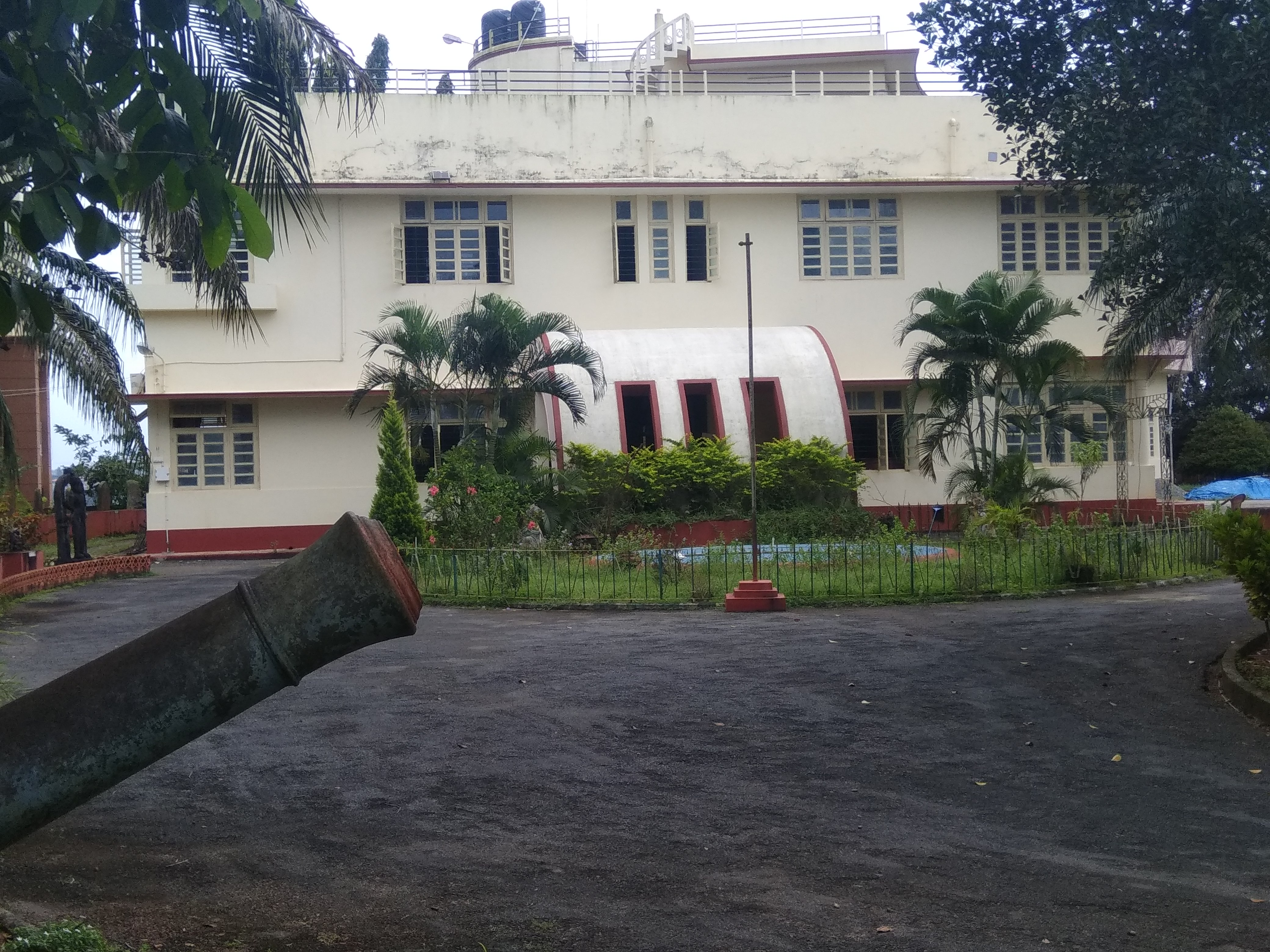 ತುಳು: ಸೀಮಾಂತಿಬಾಯಿ ಸರಕಾರಿ ಸಂಗ್ರಹಾಲಯೊ ಕುಡ್ಲ